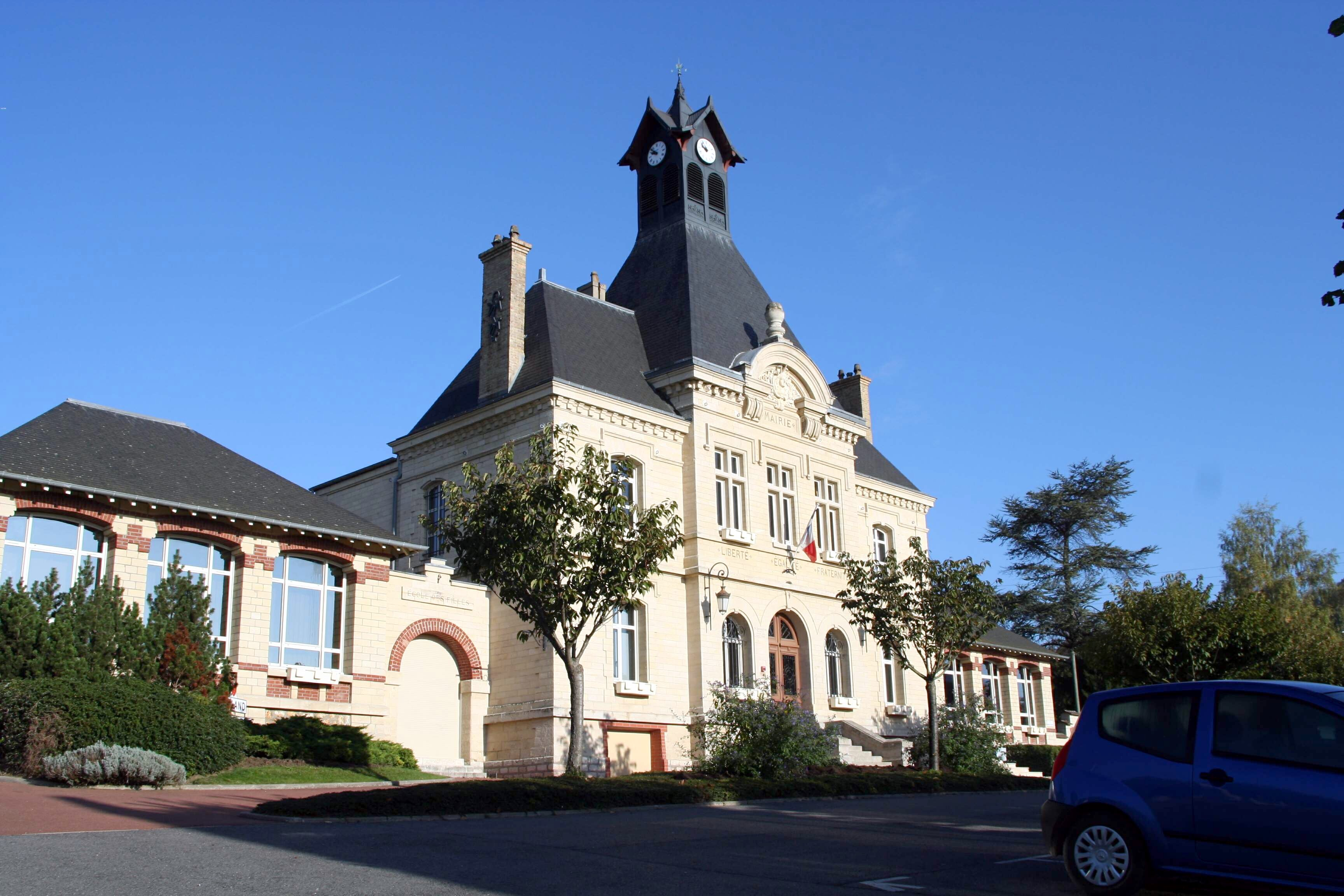 Mairie de Juziers - Yvelines (France)